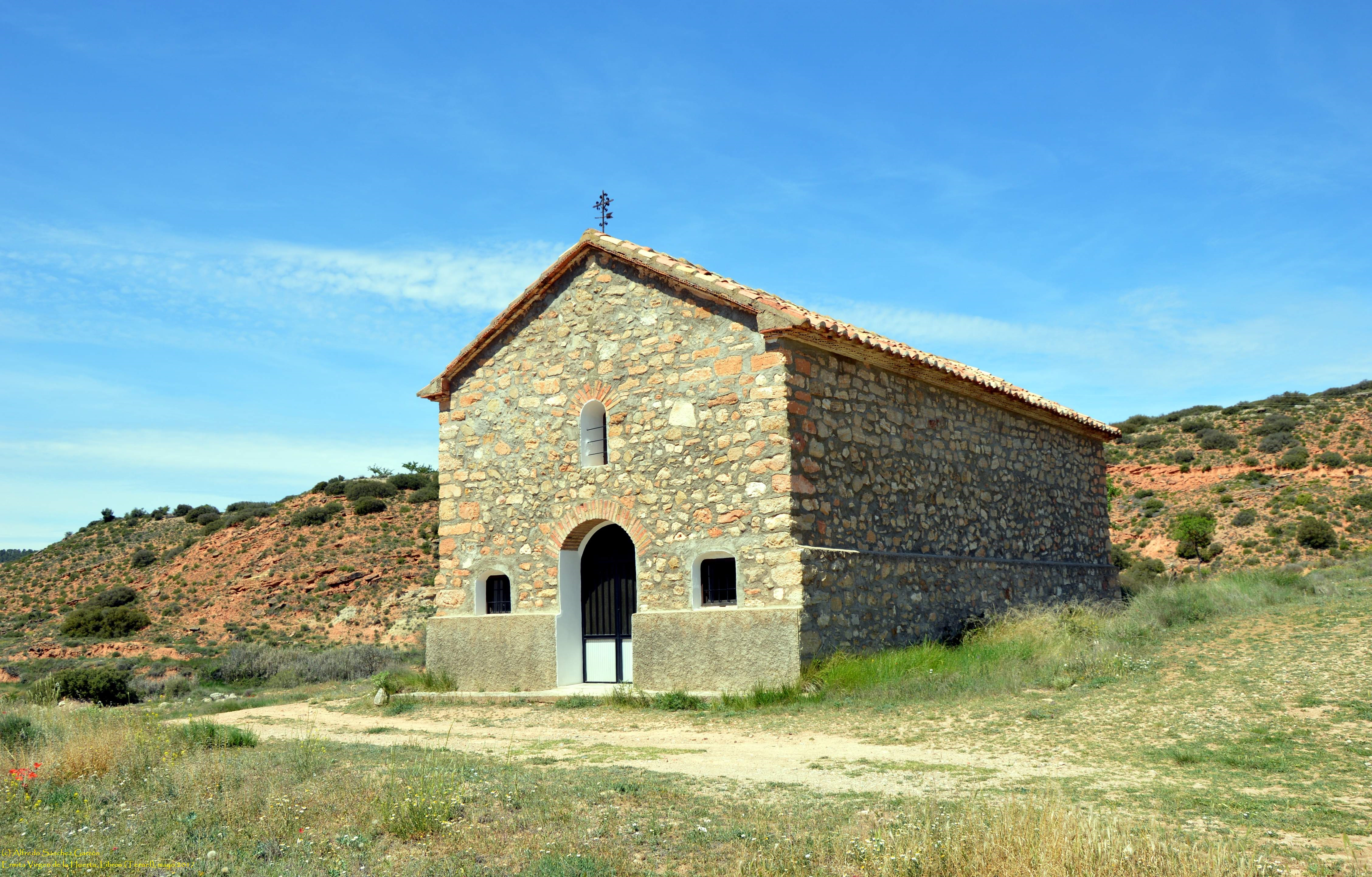 Vista general (nororiental) de la Ermita Virgen de la Huerta en Libros (Teruel).